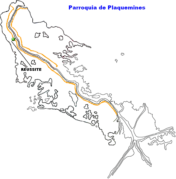 Reussite, Louisiana.